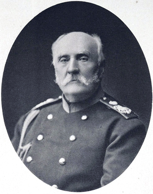 Гильденштуббе, Александр Иванович